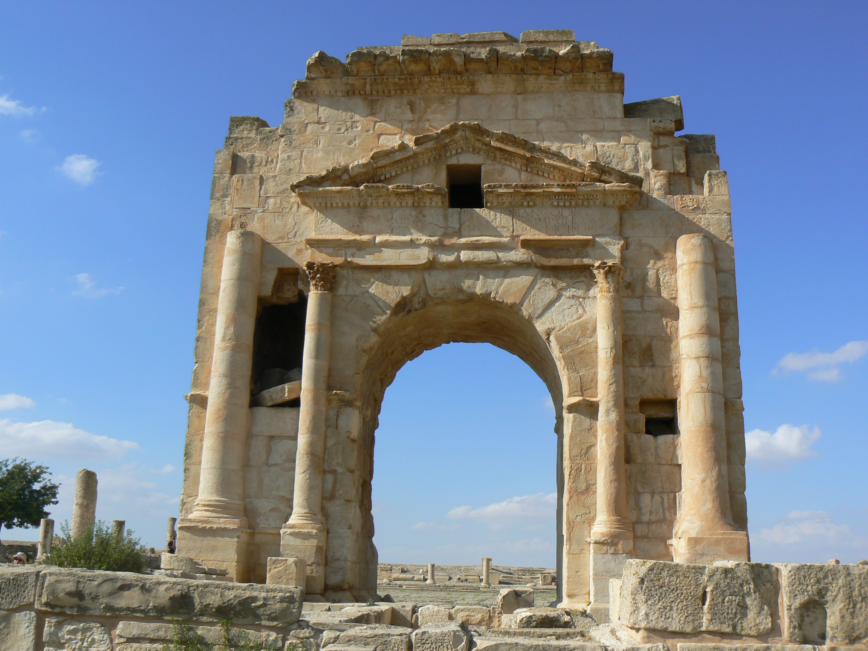 Arc de Trajan du forum de Makthar